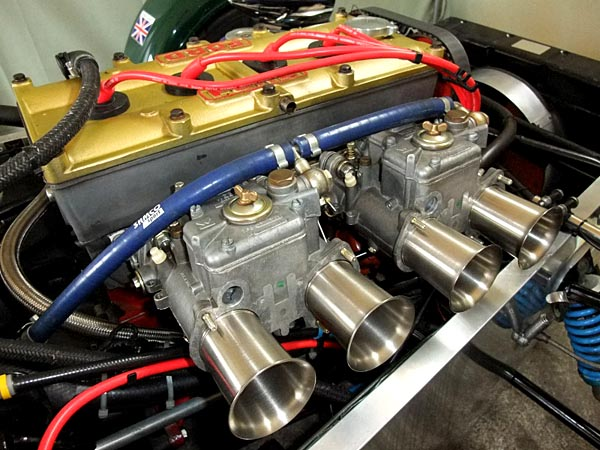 Caterham SuperSeven 1700 BDR-S